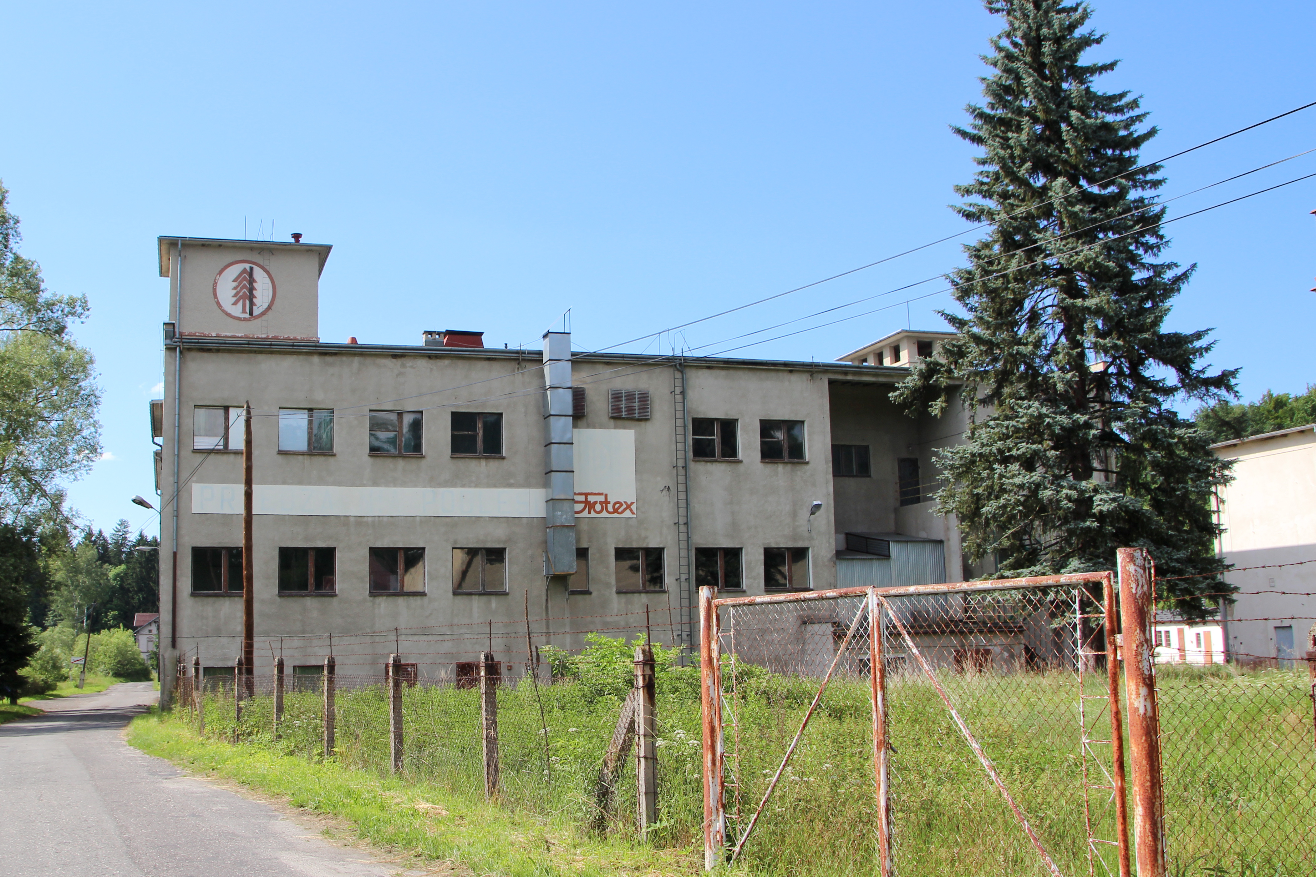 Podlesie - wieś w Polsce w województwie opolskim, w powiecie nyskim w gminie Głuchołazy.